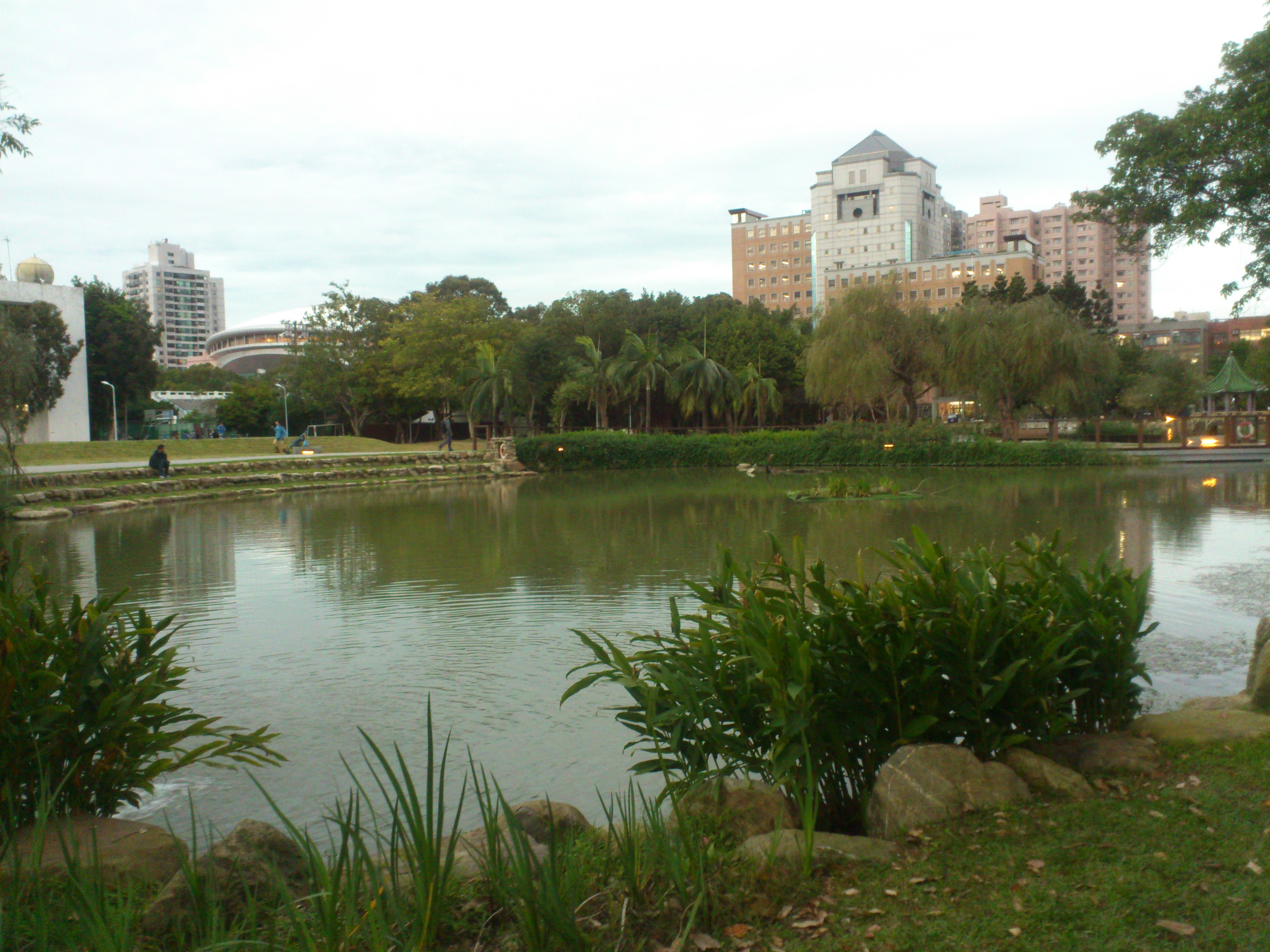 國立臺灣大學醉月湖小湖